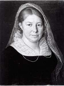 zweite Ehefrau Wendelin Moosbruggers